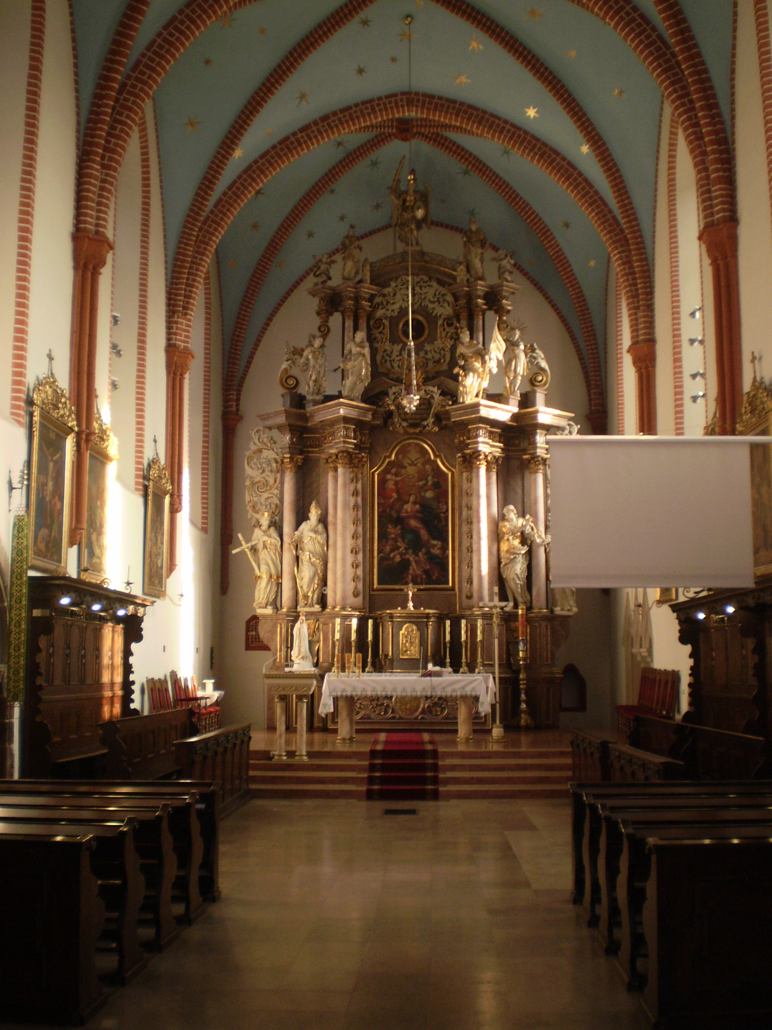 Ołtarz w grodkowskim kościele.